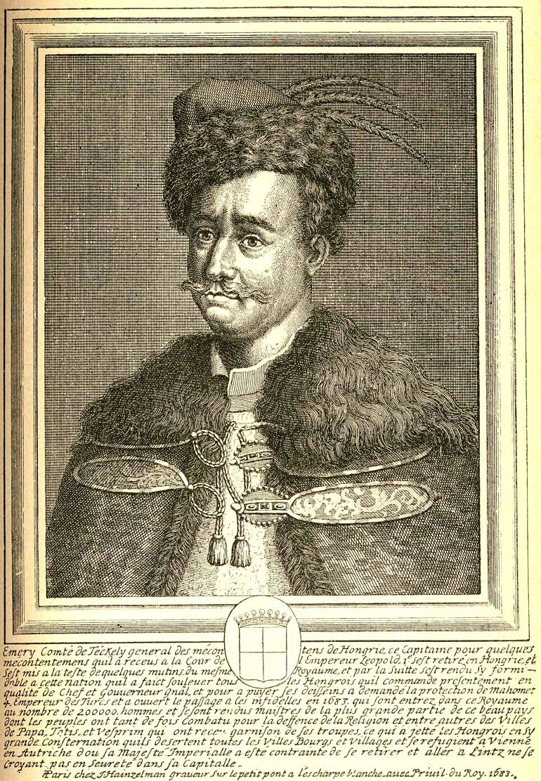 THÖKÖLY IMRE ARCKÉPE. (Egykorú francia metszet után az országos képtárból.)